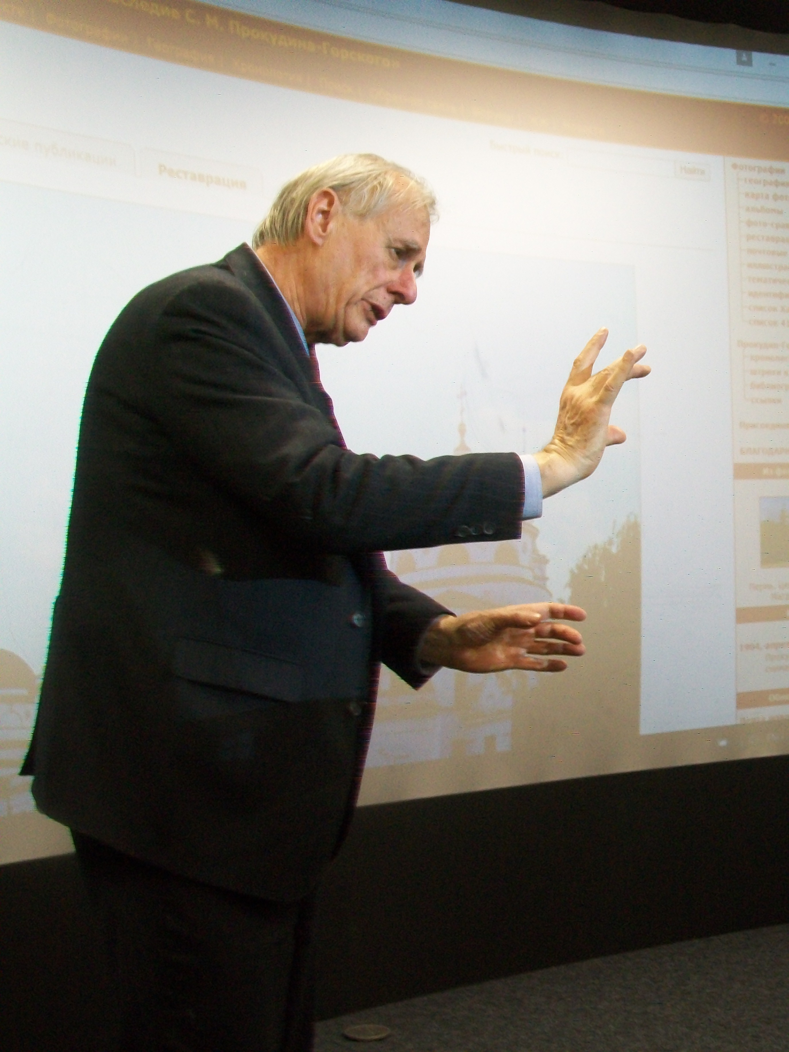 Американский славист Уильям Крафт Брумфилд читает лекцию в Ельцин-центре о Прокудине-Горском. 3 апреля 2017 года